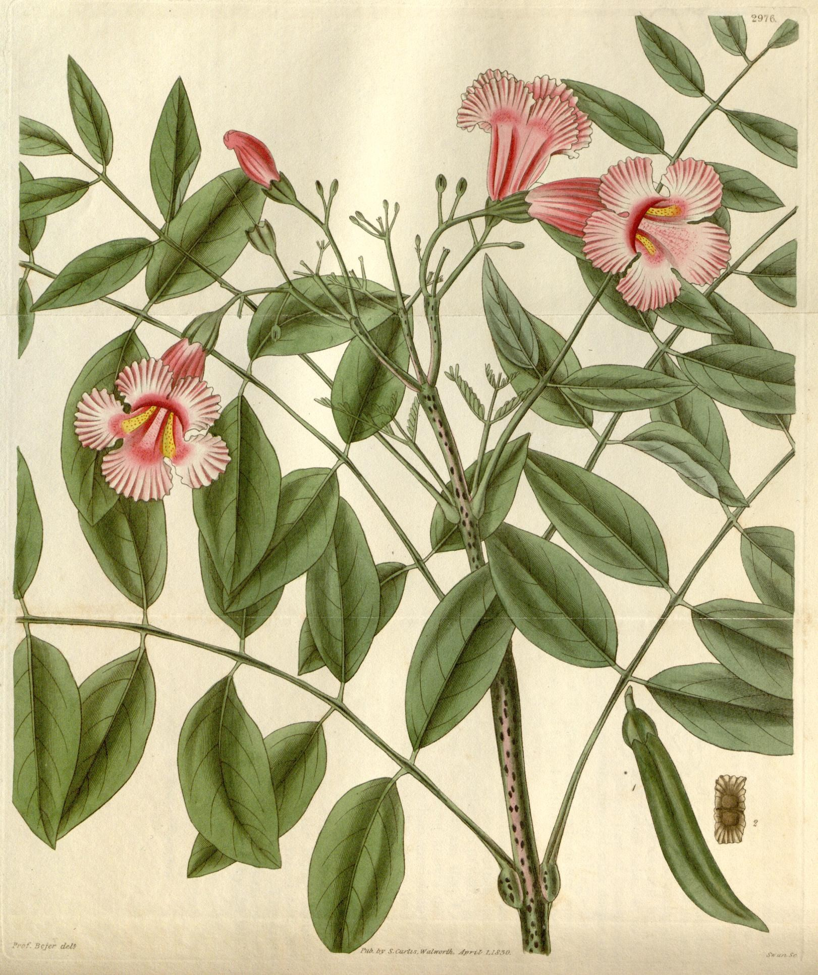 Curtis's botanical magazine. Bignonia telfairiae